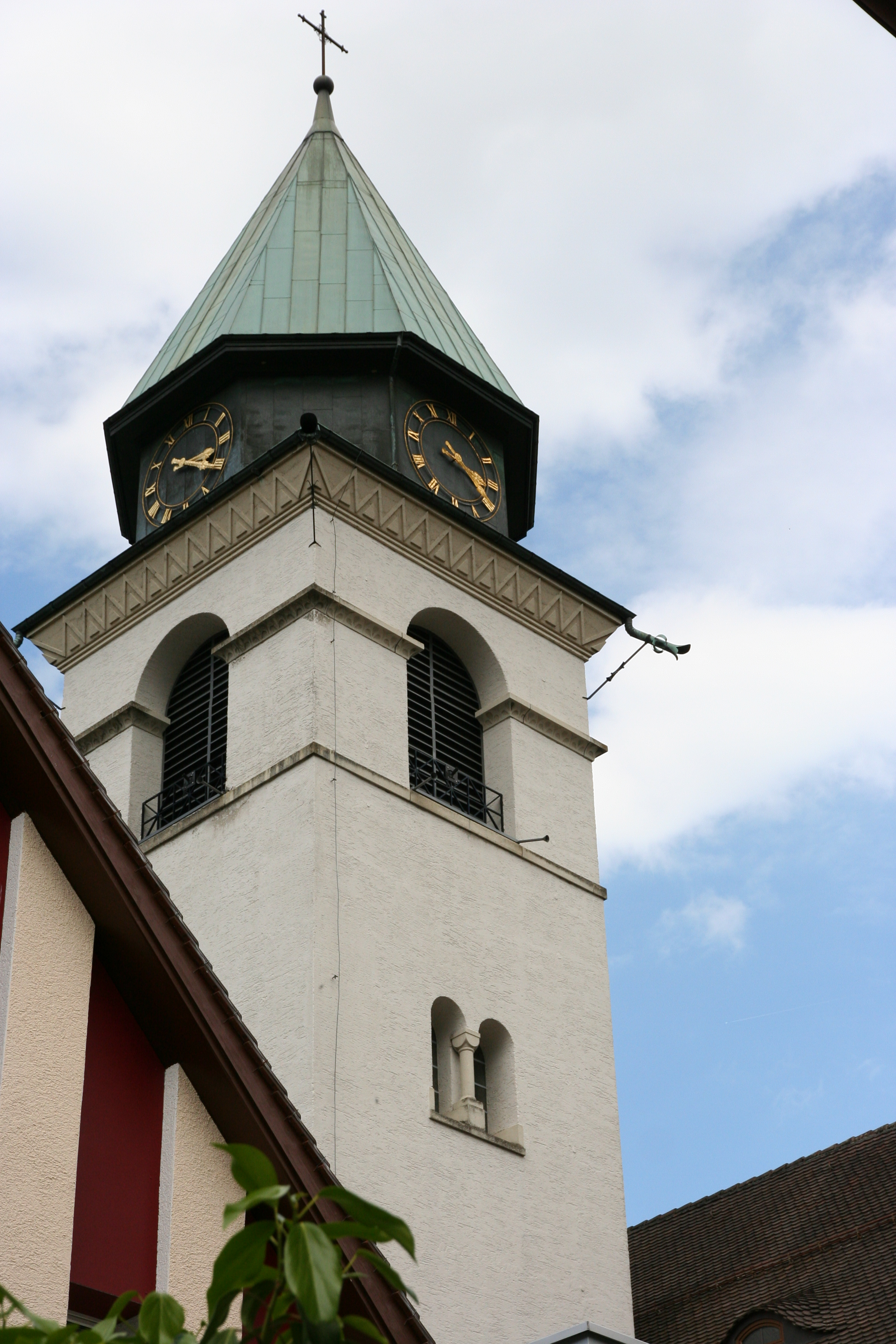 Römisch-katholische Pfarrkirche St. Margareten Wald, Kirchturm